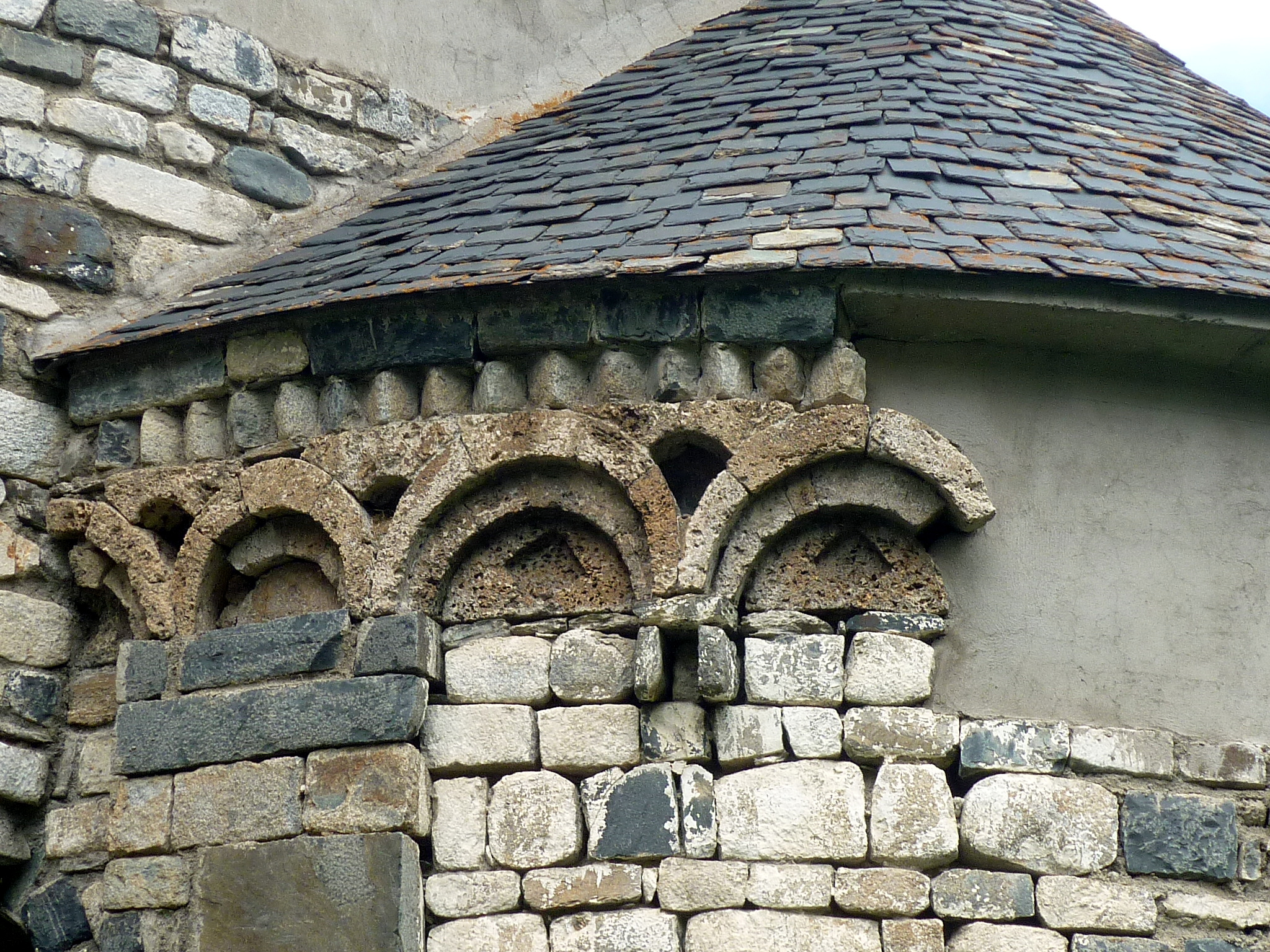 Església de Santa Maria de Mijaran (Vielha e Mijaran): detall de l'absis